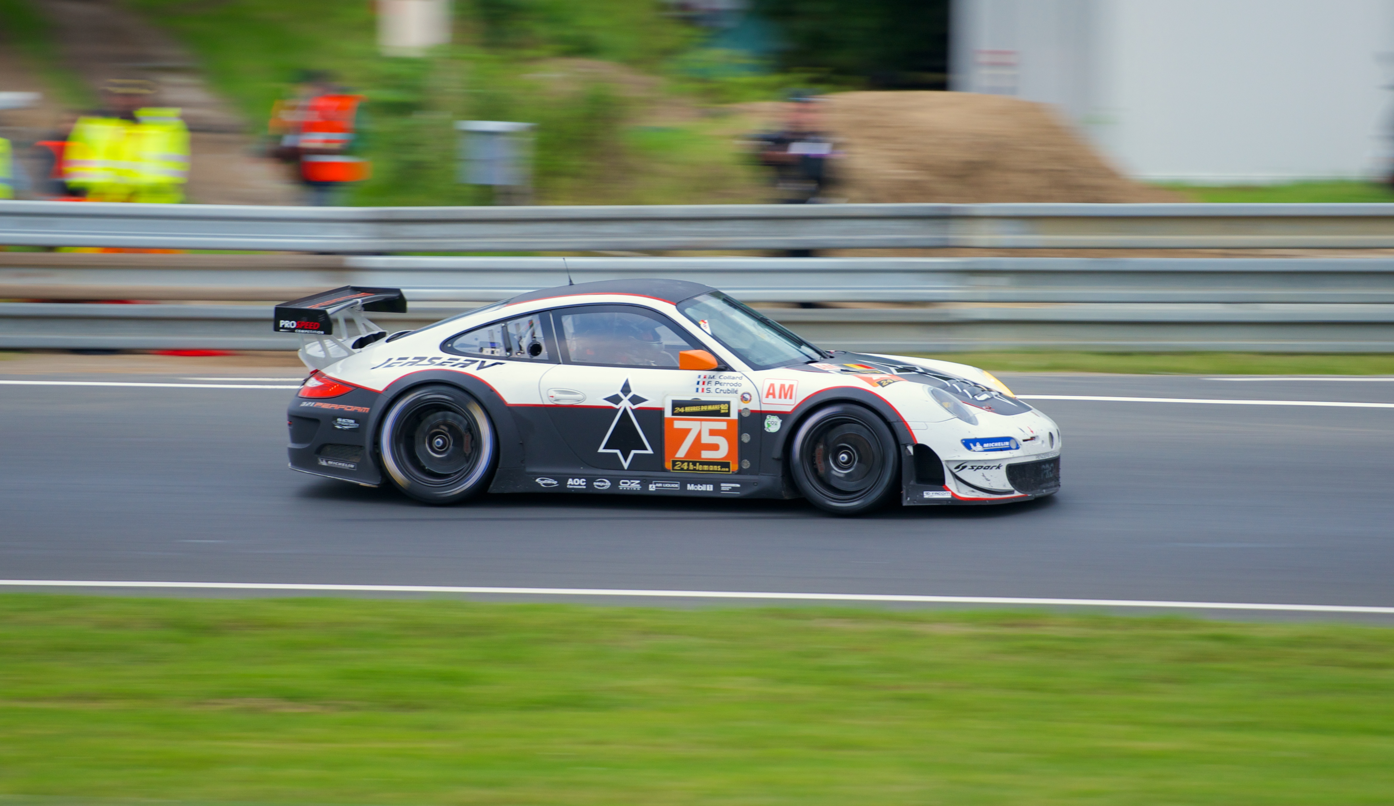 KAM_5110